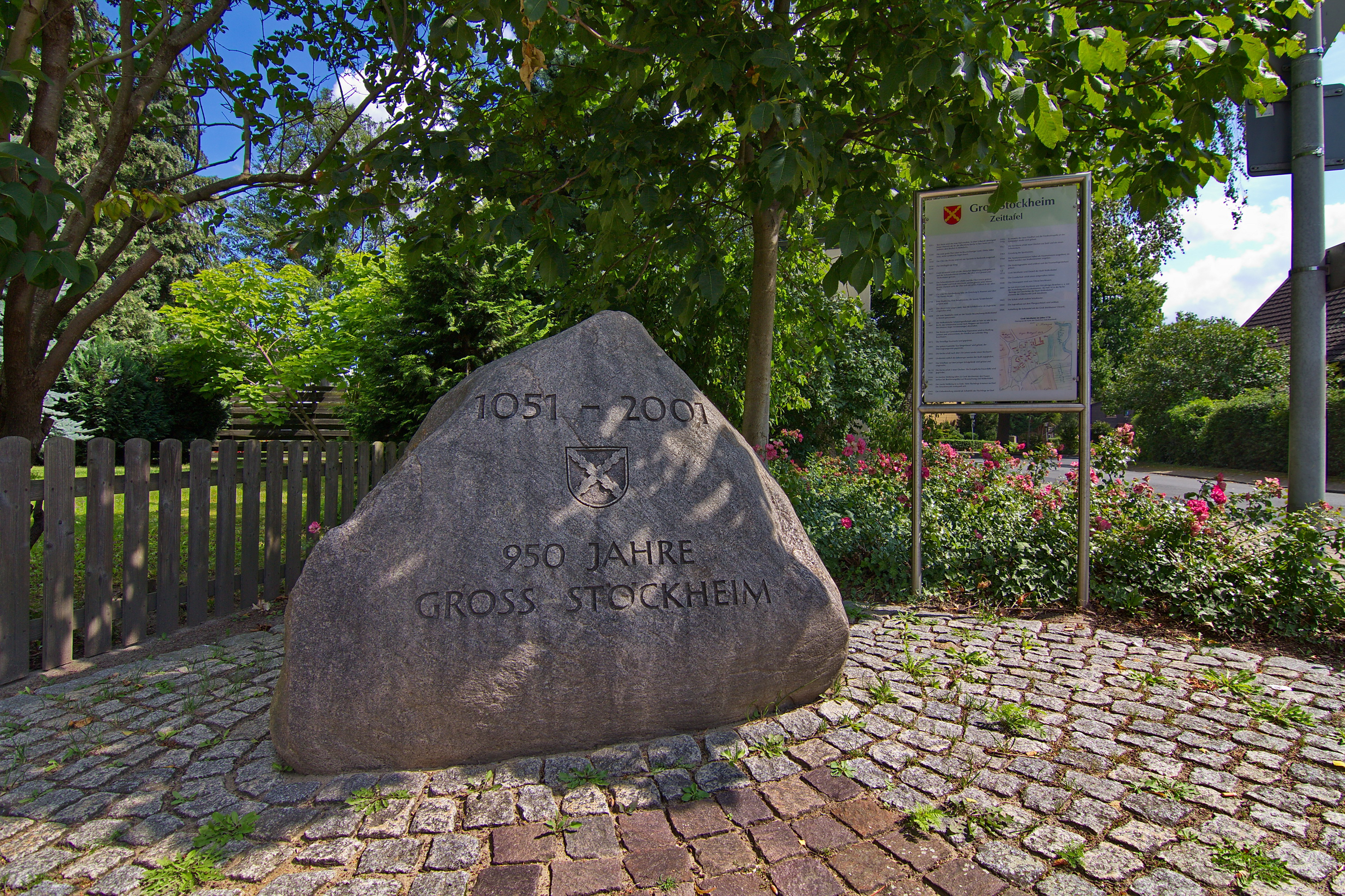 Gedenkstein in Groß Stöckheim (Wolfenbüttel), Niedersachsen, Deutschland